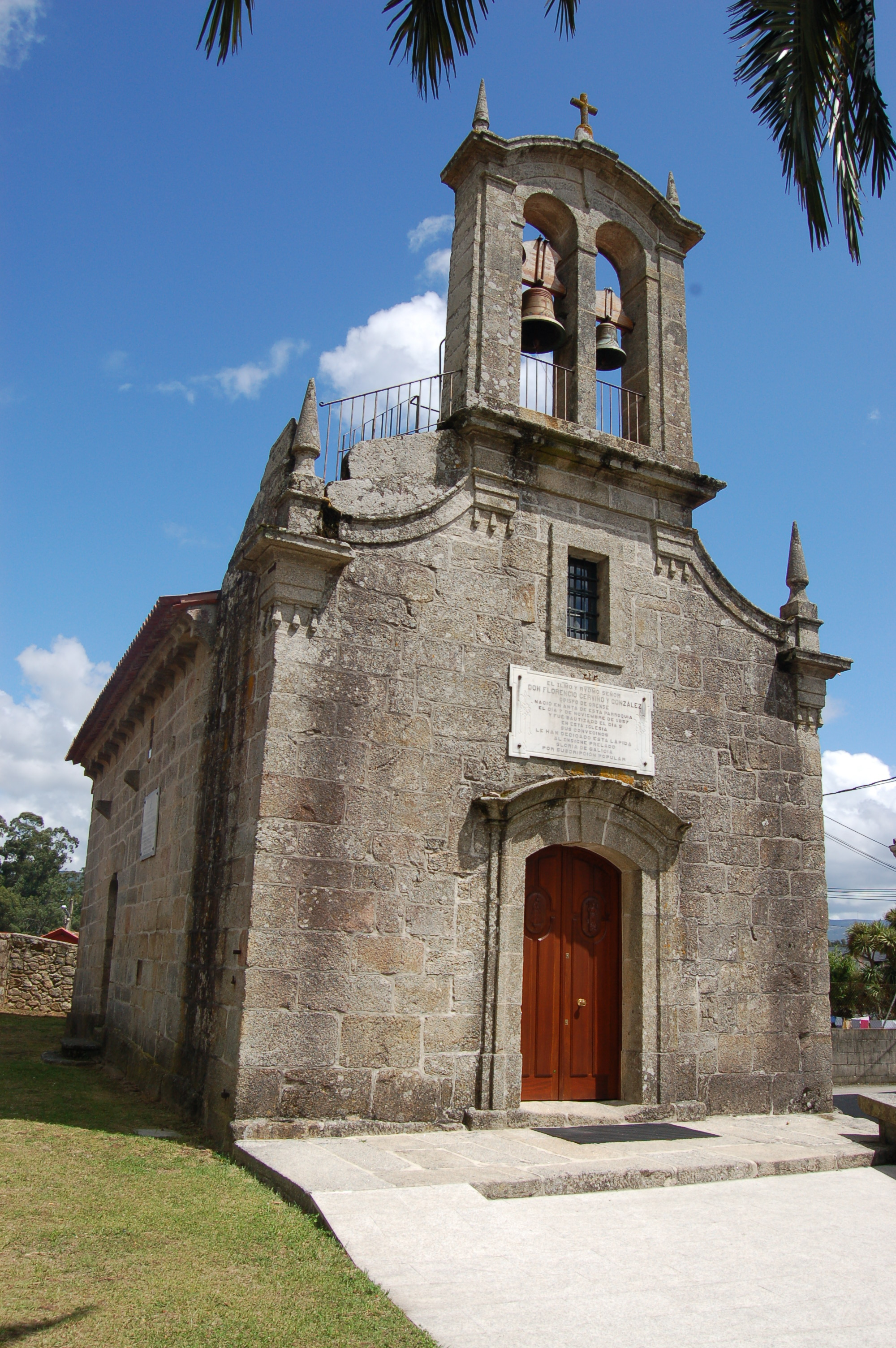 Igrexa parroquial de Areas (Tui).